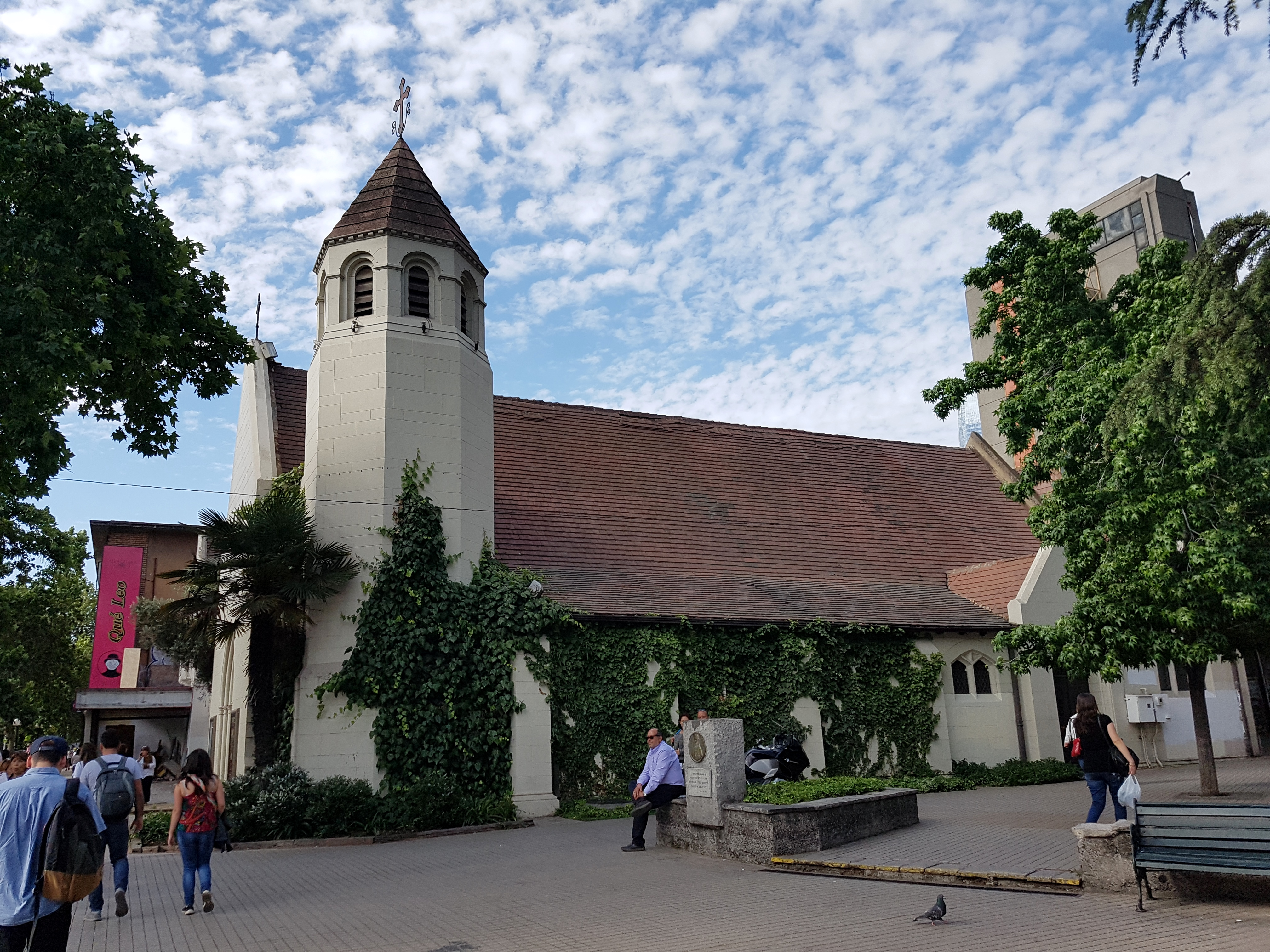 Iglesia ortodoxa de la Santísima Virgen María, Providencia, Santiago de Chile